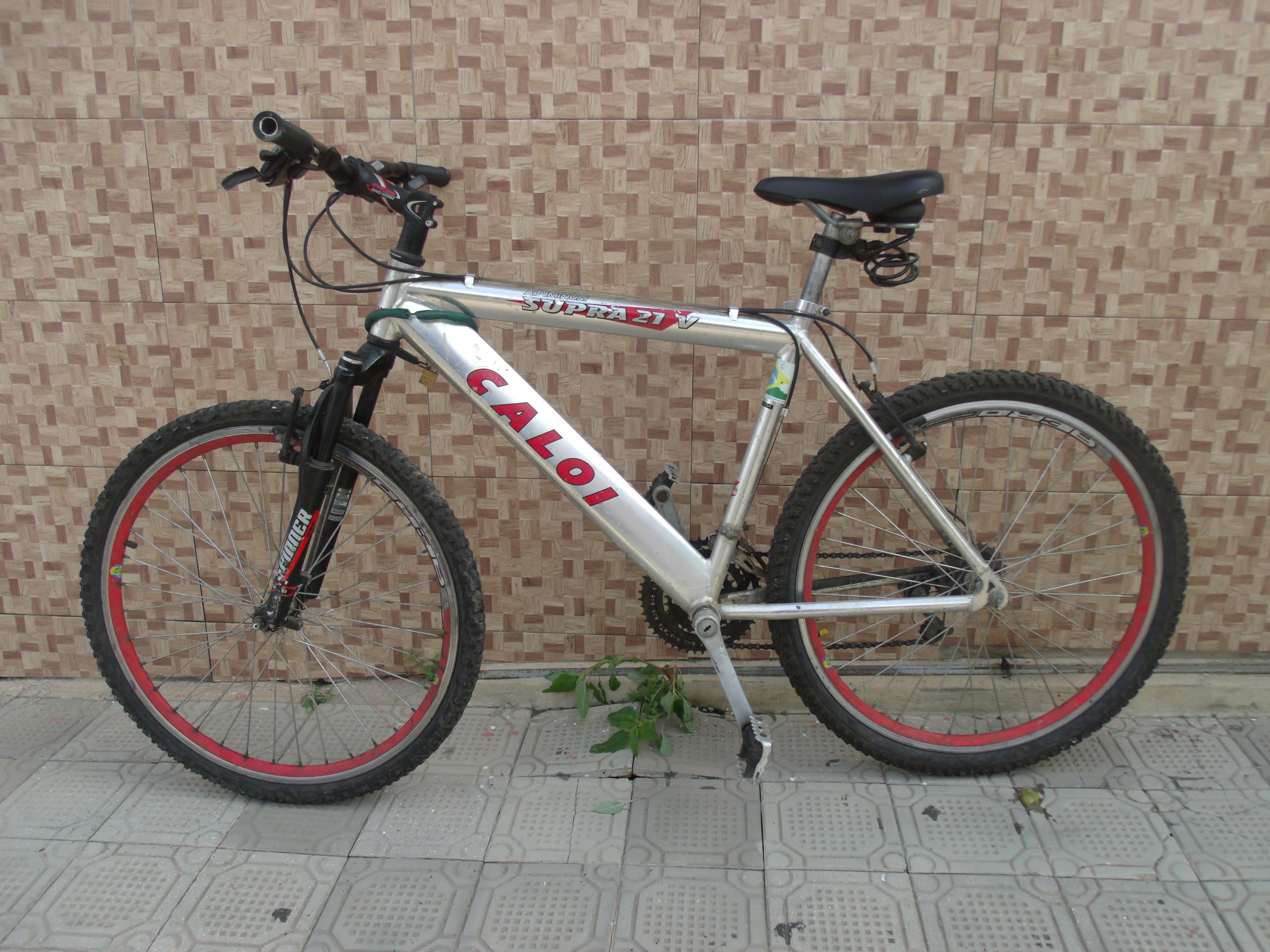 Uma bicicleta brasileira, marca Caloi, em alumínio.